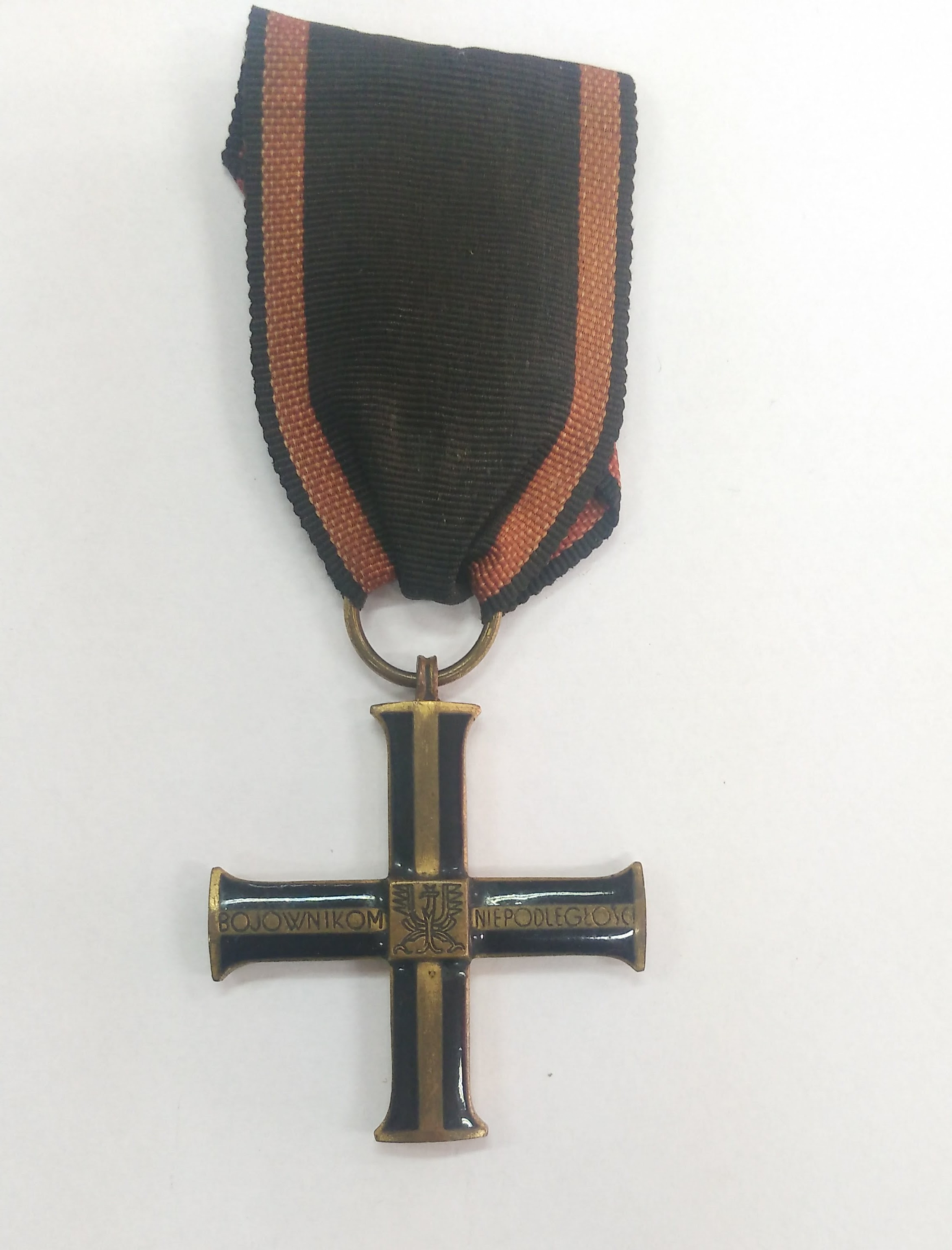 Awers Krzyża Niepodległości